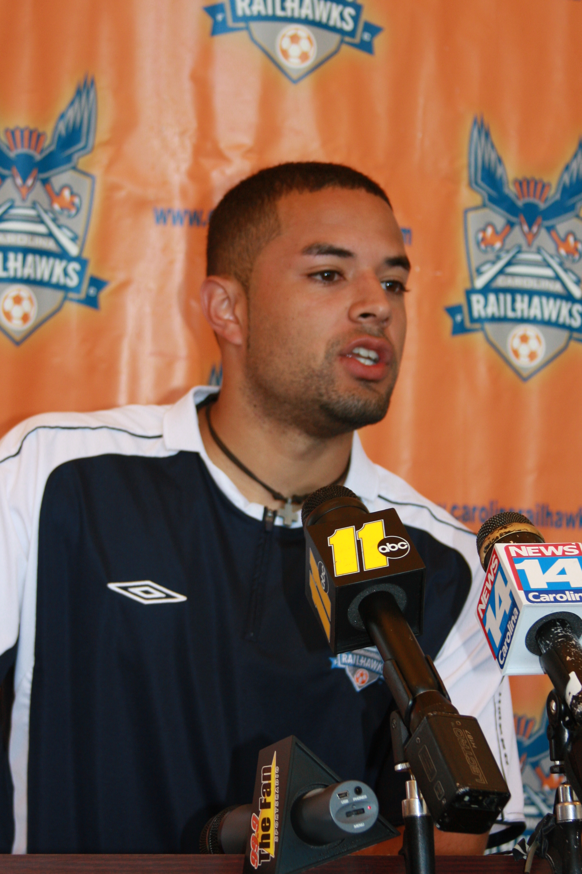 Richard Perdomo